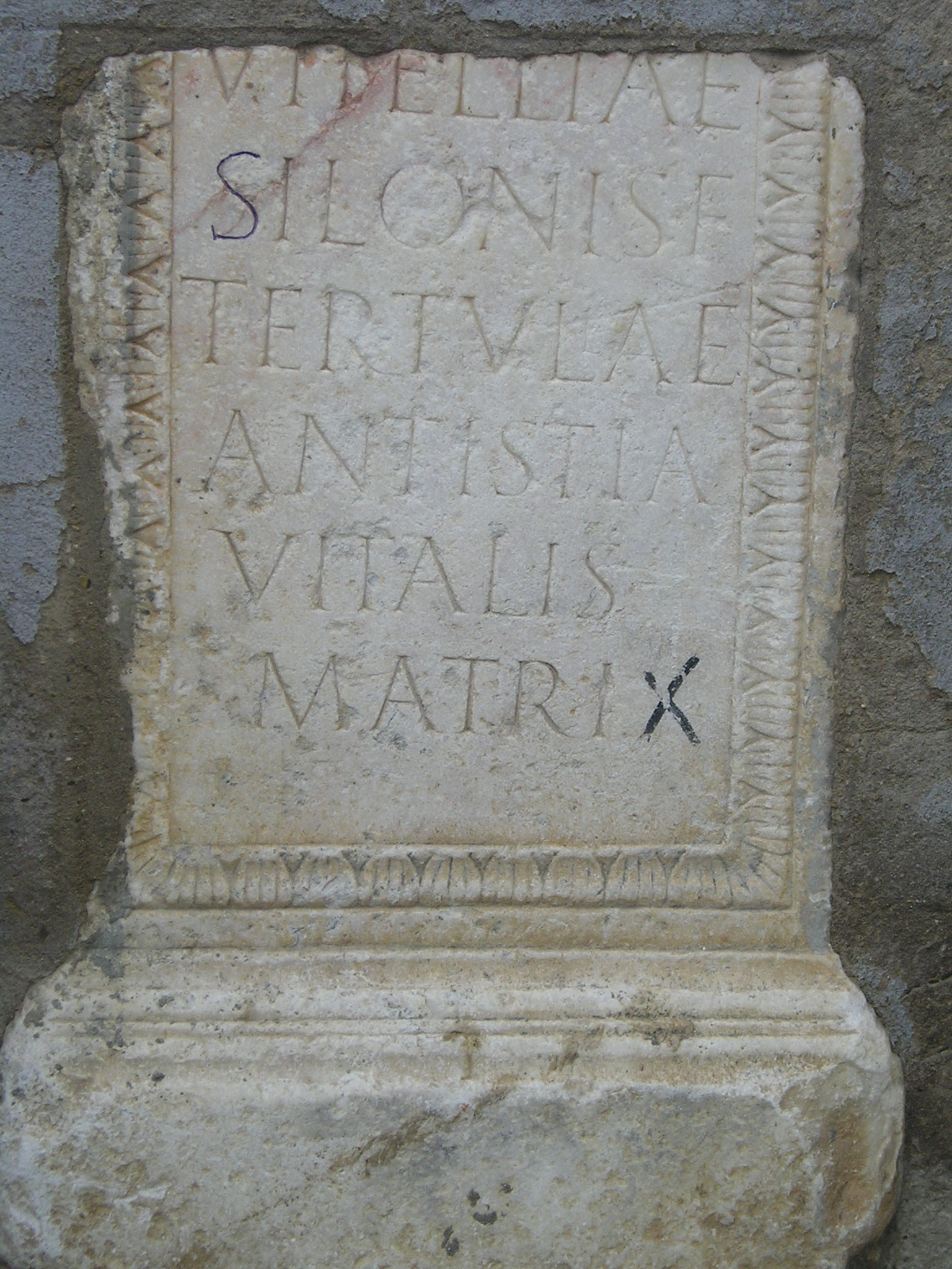 Inscripción funeraria romana procedente de Coria (Cáceres, España) conservada en la puerta del Antiguo Seminario Concialiar, correspondiente con CIL II 792: Vitelliae / Silonis f(iliae) / Tertullae / Antistia / Vitalis / matri